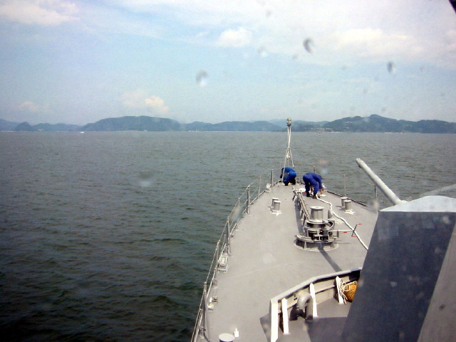 ミサイル艇おおたかの艦橋からの眺め。